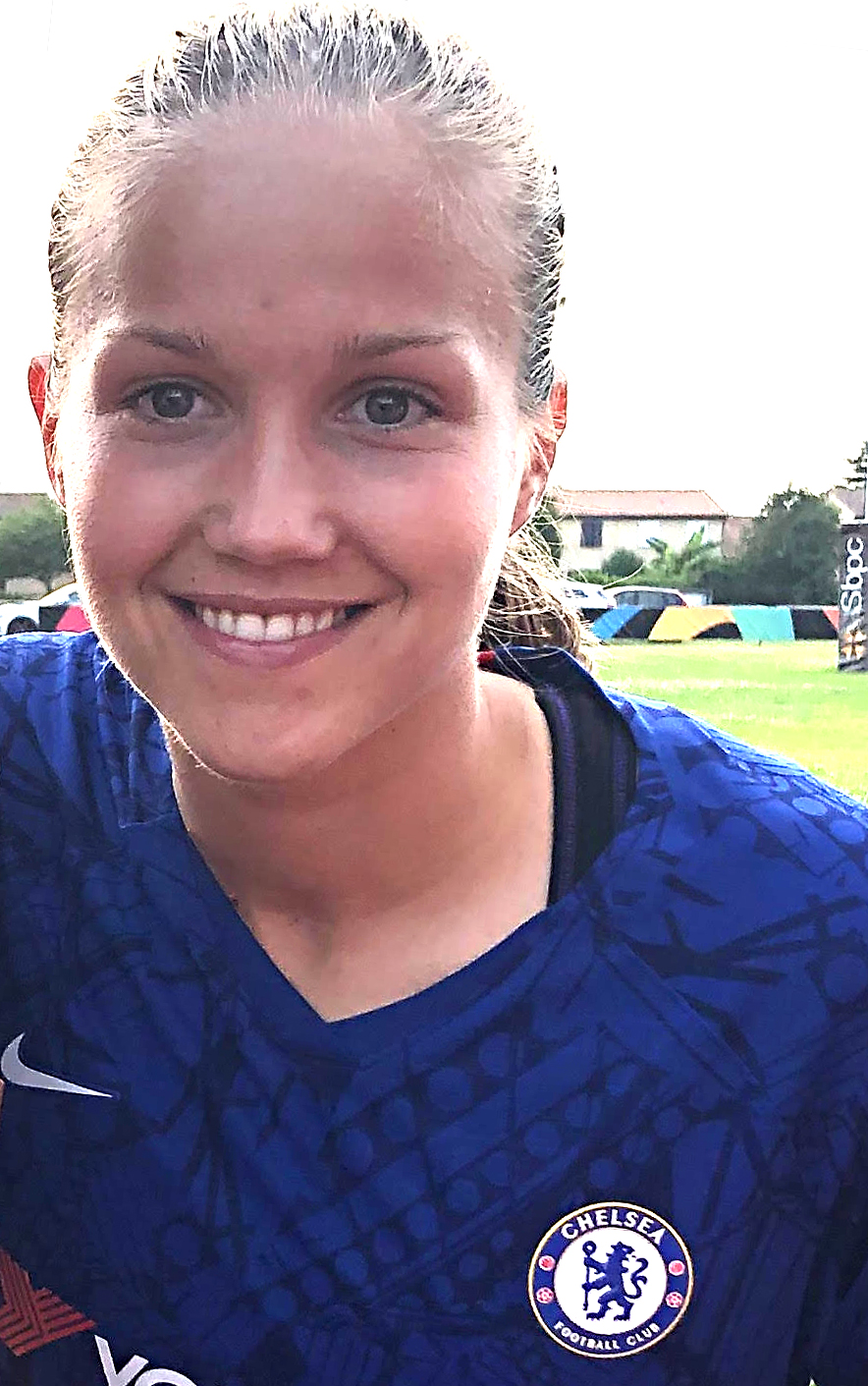 Guro REITEN lors du match à Toulouse de la Women's French Cup : Chelsea - Montpellier